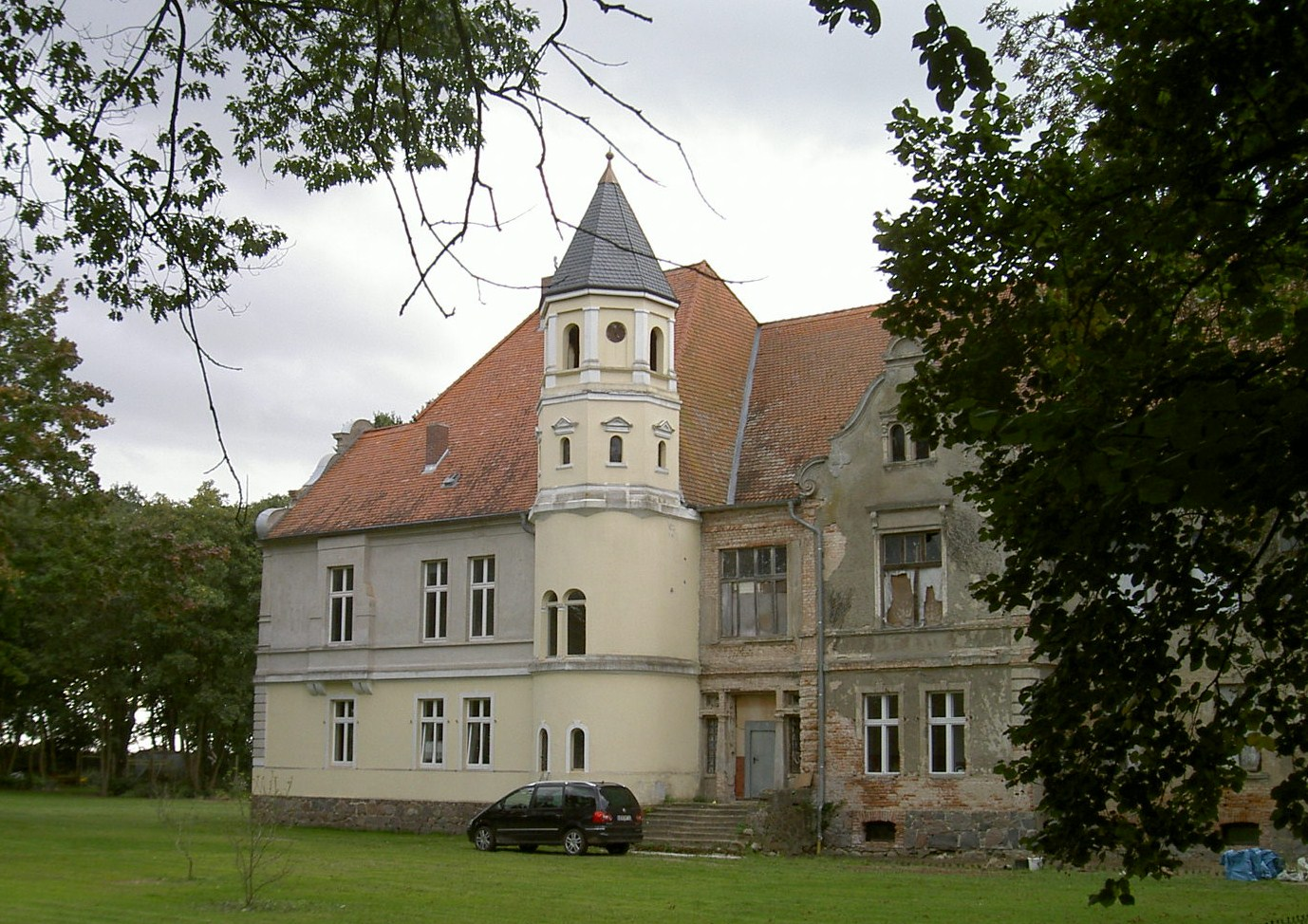 Schloss Sophienhof, Gemeinde Ducherow (2010)